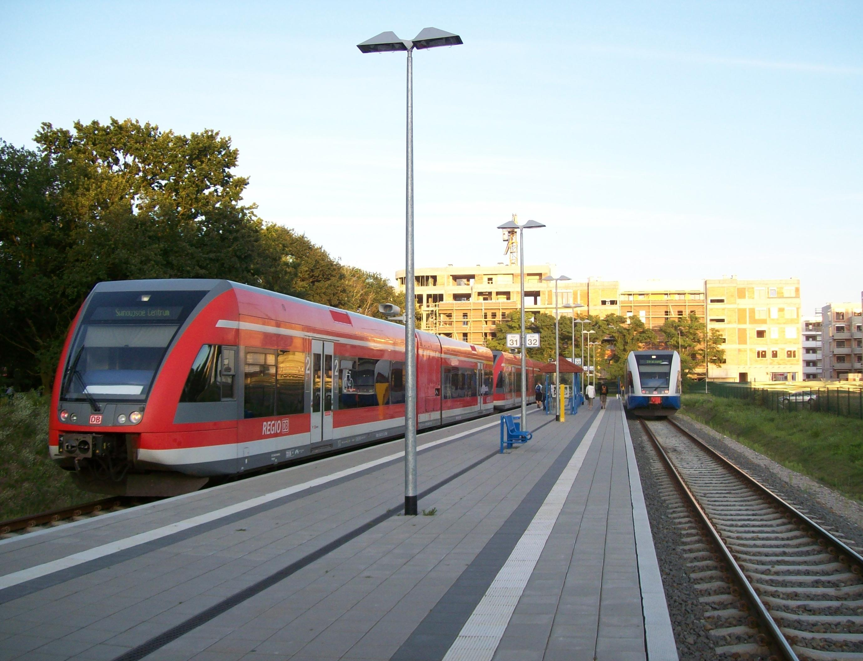 Stacja Świnoujście Centrum.